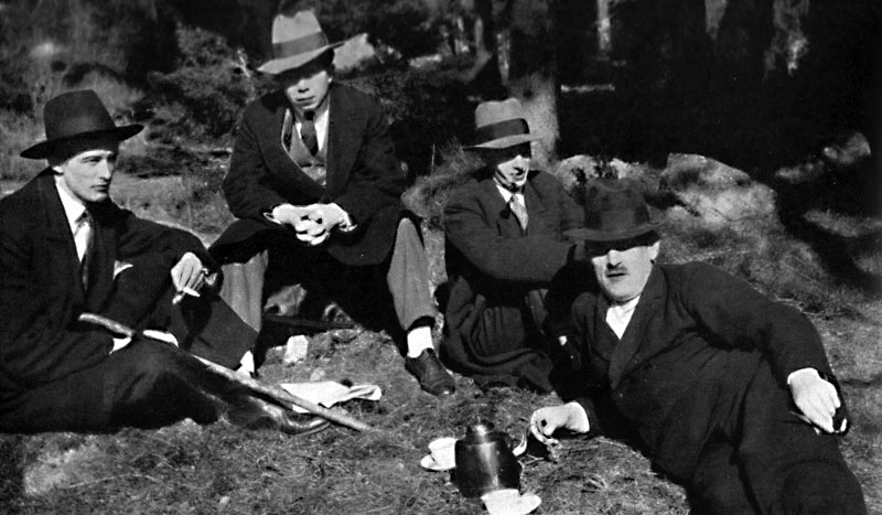 Gustav Hedenvind-Eriksson med författarkollegor i Flysta